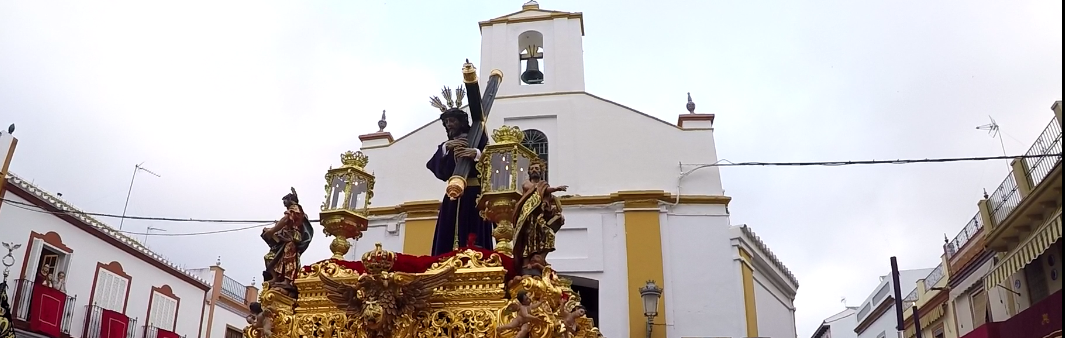 Vista de la fachada durante la salida procesional del Viernes Santo por la mañana de Ntro. Padre Jesús del Gran Poder y María Stma. de la Soledad el 25 de Marzo de 2016